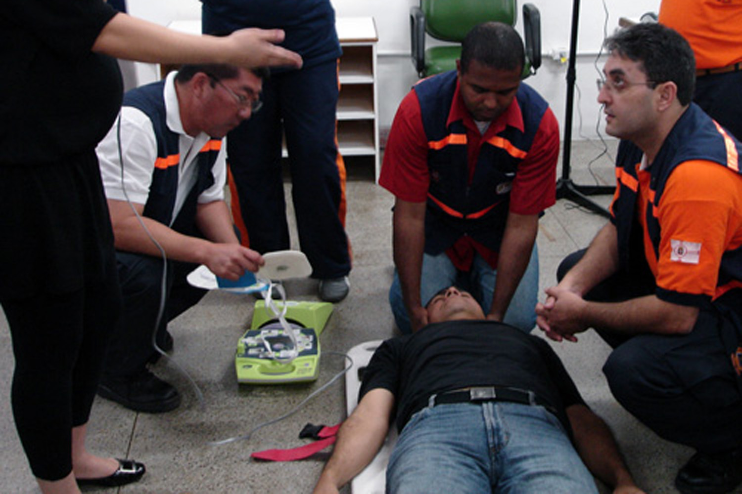 Imagem de SP